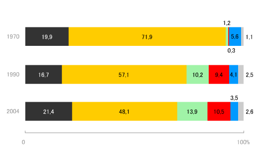 Энергобаланс Японии